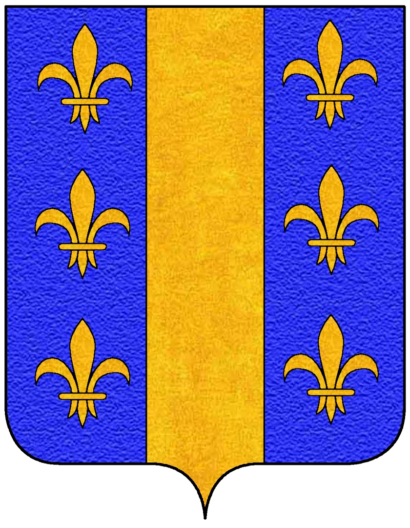 Stemma della famiglia Canali, appartenente al patriziato di Venezia.